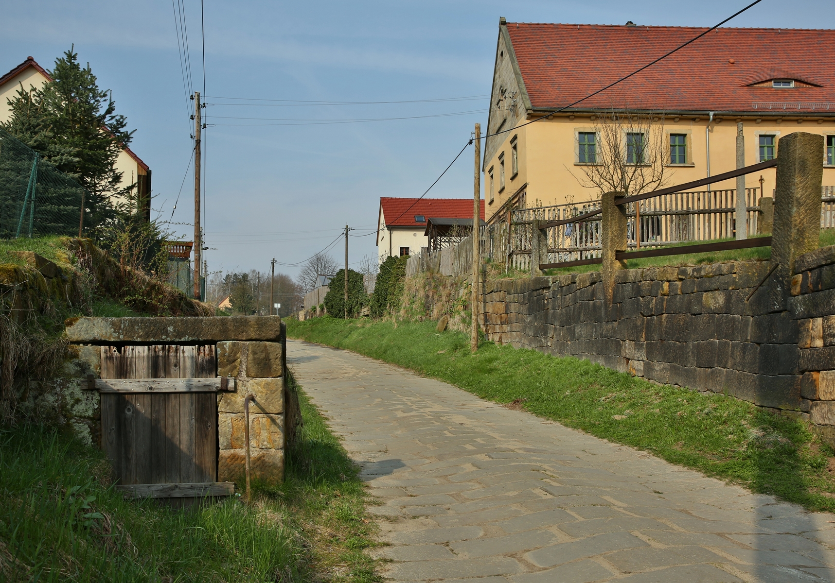 Uttewalde (Sächsische Schweiz): Blick in die Grundstraße mit dem historischen Sandsteinpflaster.